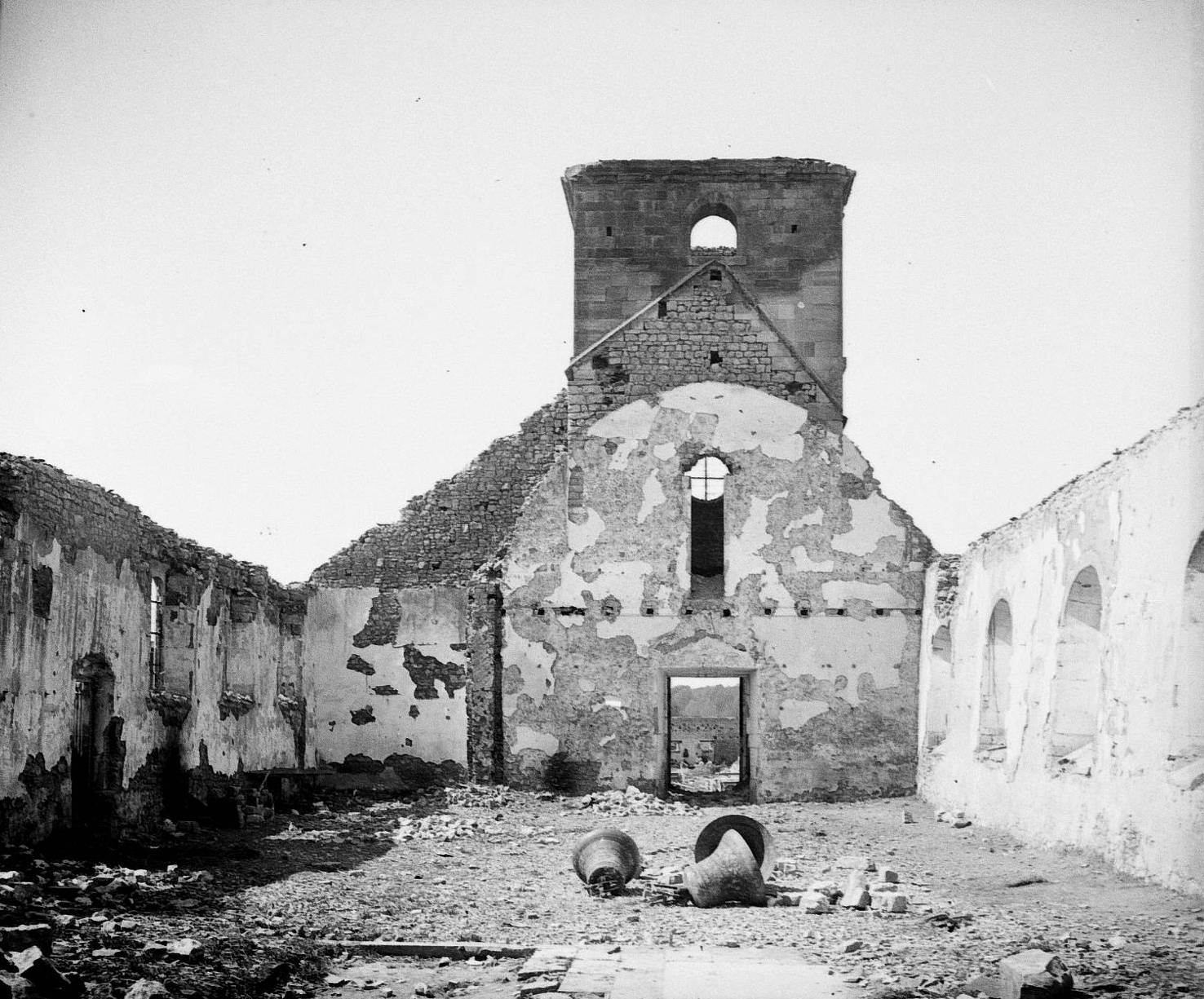 Vue des ruines de l'église de Vaubecourt (Meuse) suite à un bombardement. 1916. Guerre 1914-1918. Au centre les cloches de l'église.